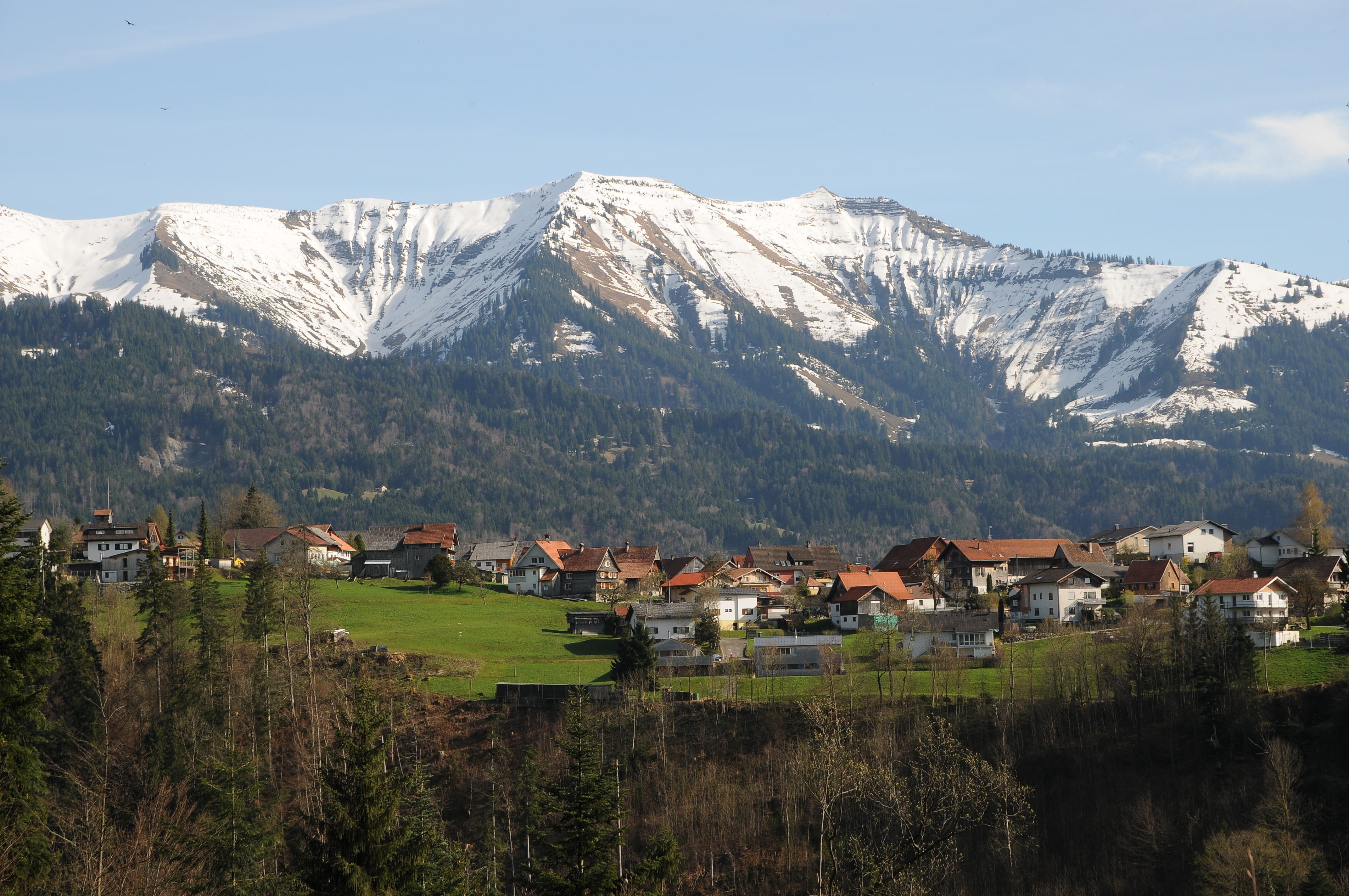 Kehlegg ist ein Bergdorf im Gemeindegebiet der Stadt Dornbirn in Vorarlberg (Österreich). Gesehen von der Parzelle Schwendebach in Watzenegg. Im Hintergrund die Mörzelspitze 1.830m im appernden First.